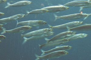 Pacific Sardine (Sardinops sagax)